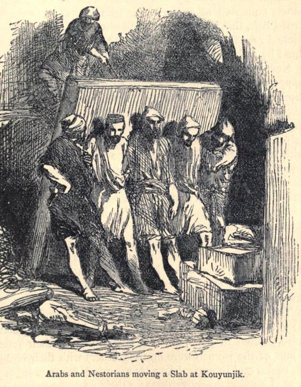 Abtransport eines Flachreliefs